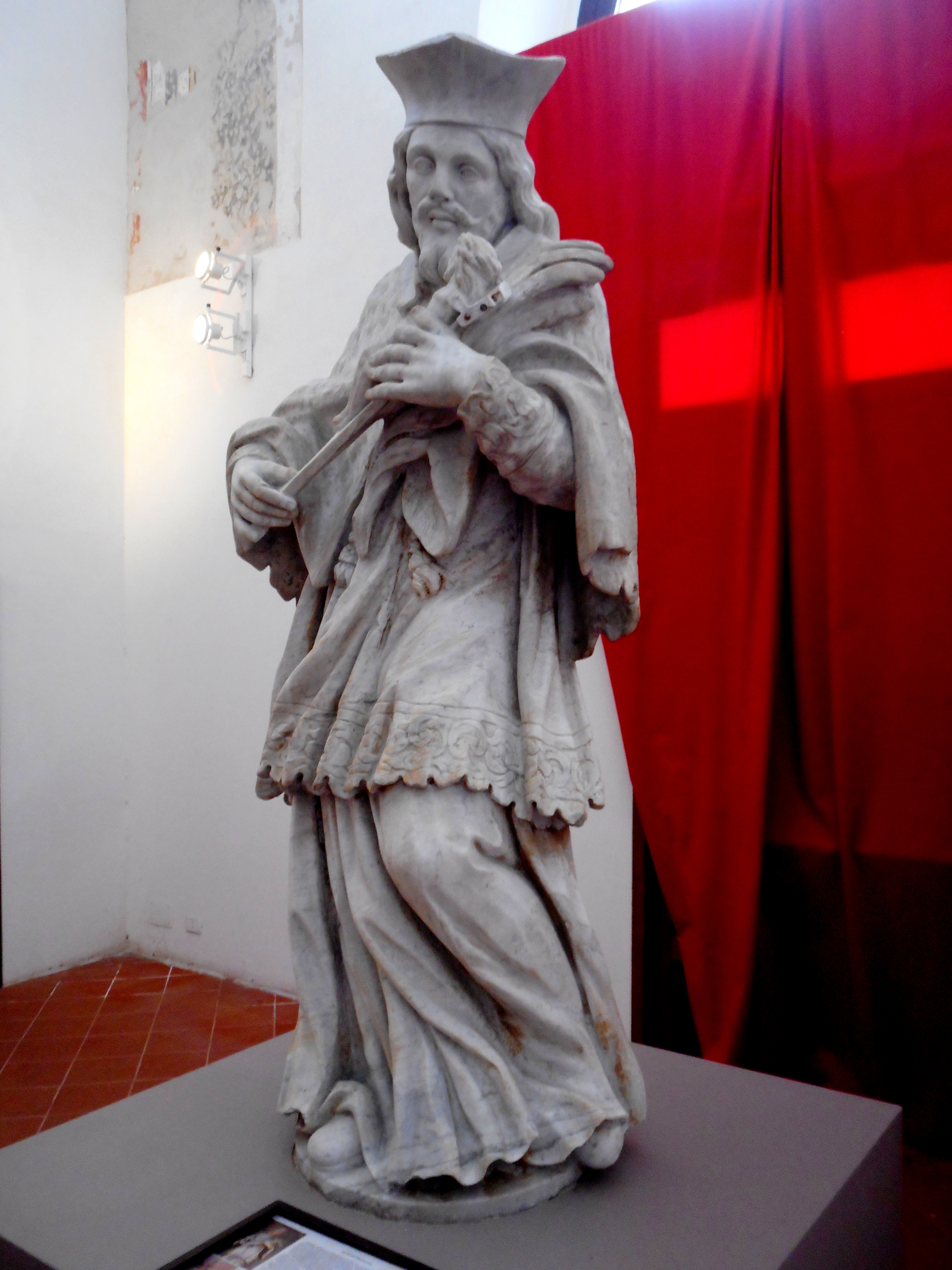 Statua di San Giovanni Nepomuceno nella chiesa di San Giacomo dei Militari a Palermo